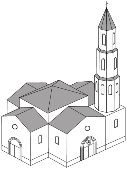 Iglesia de San Jaime (Tudela), desaparecida; reconstrucción del edificio para principios del siglo XIX.